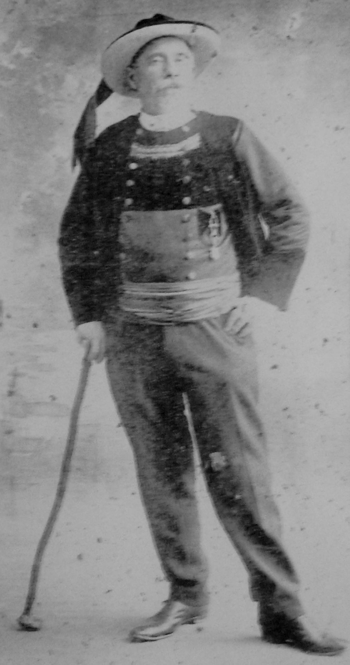 Jos Parker, célèbre poète fouesnantais, en 1891